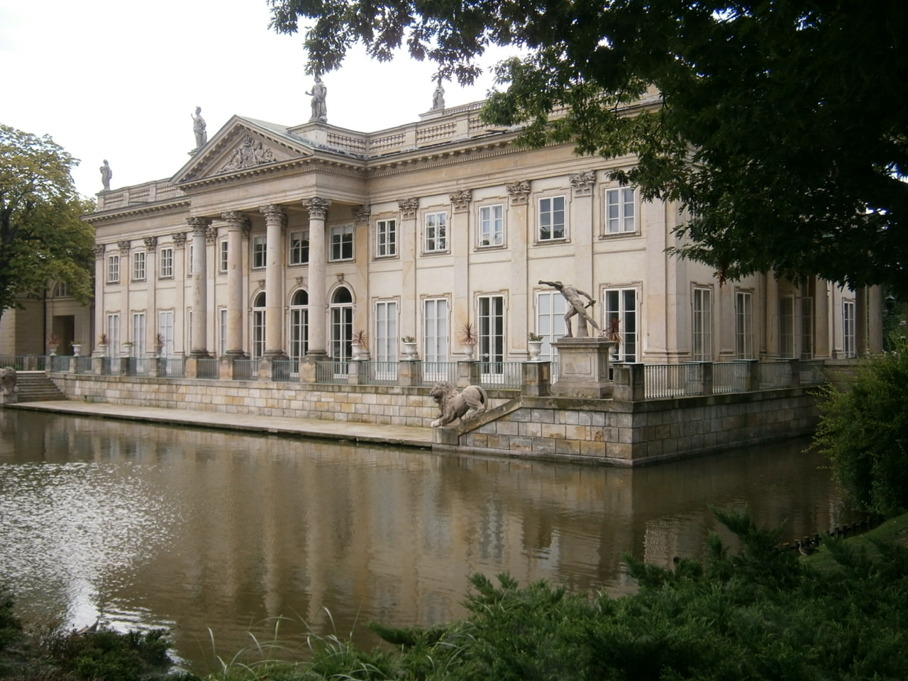 Warszawa, Pałac na Wodzie, XVII, XIX